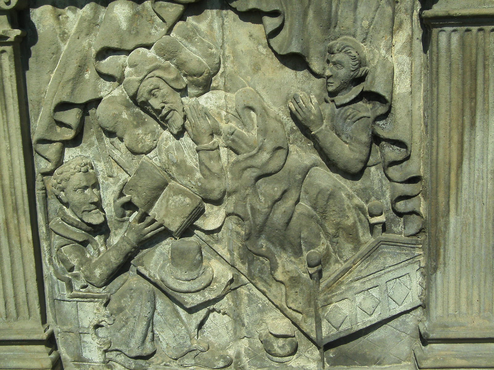 Relief op de bewaard gebleven timpaan van de poort uit 1618 van het Geertruiden gasthuis te Deventer. Huidige standplaats is bij de toegang tot de parkeergarage van het nieuwe Deventer ziekenhuis op de Rielerenk uit 2005.